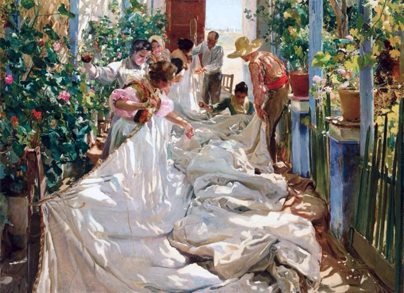 Artista: Joaquín Sorolla y Bastida